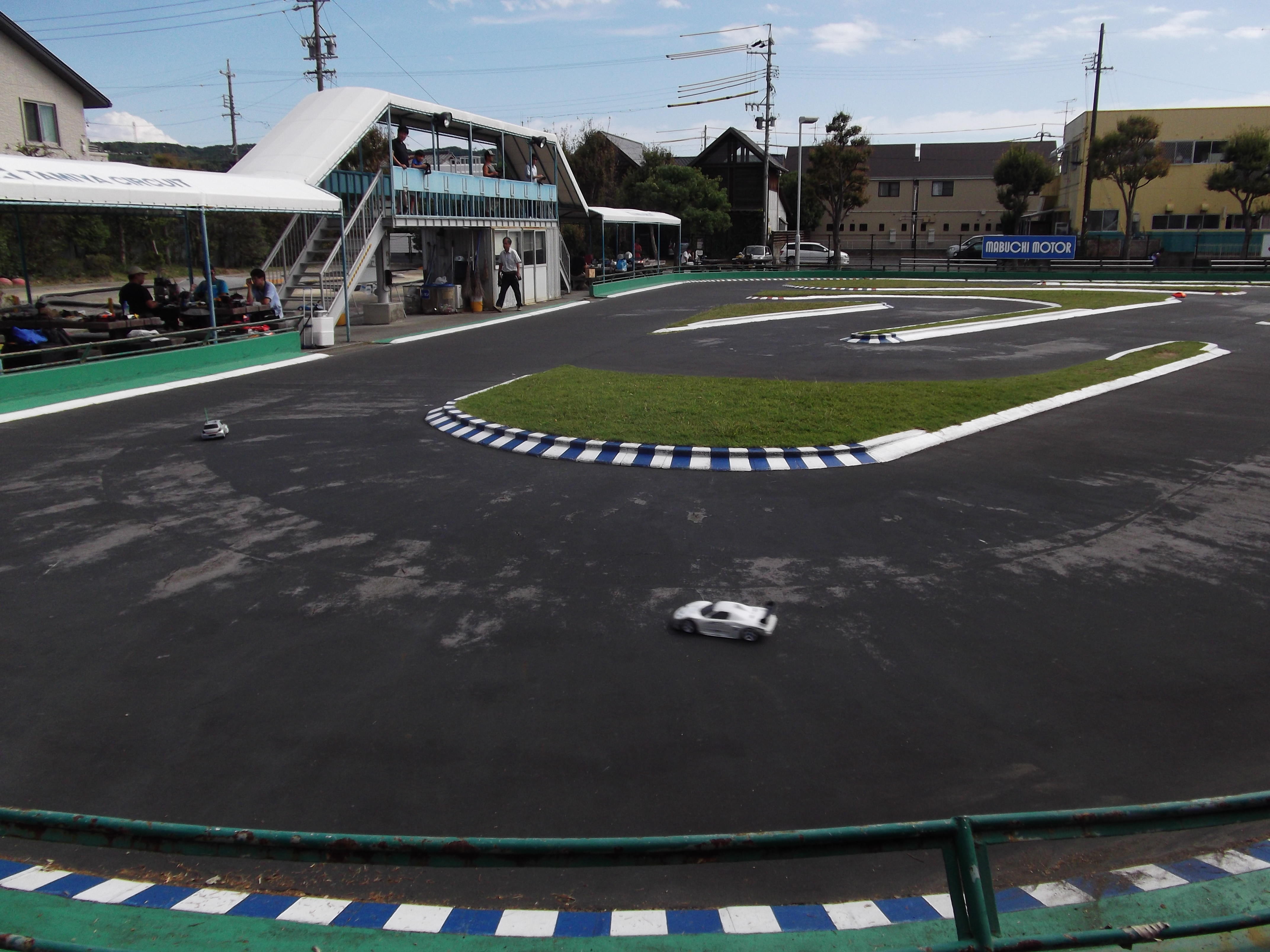 静岡県静岡市駿河区池田にあるタミヤサーキットのオンロードコース